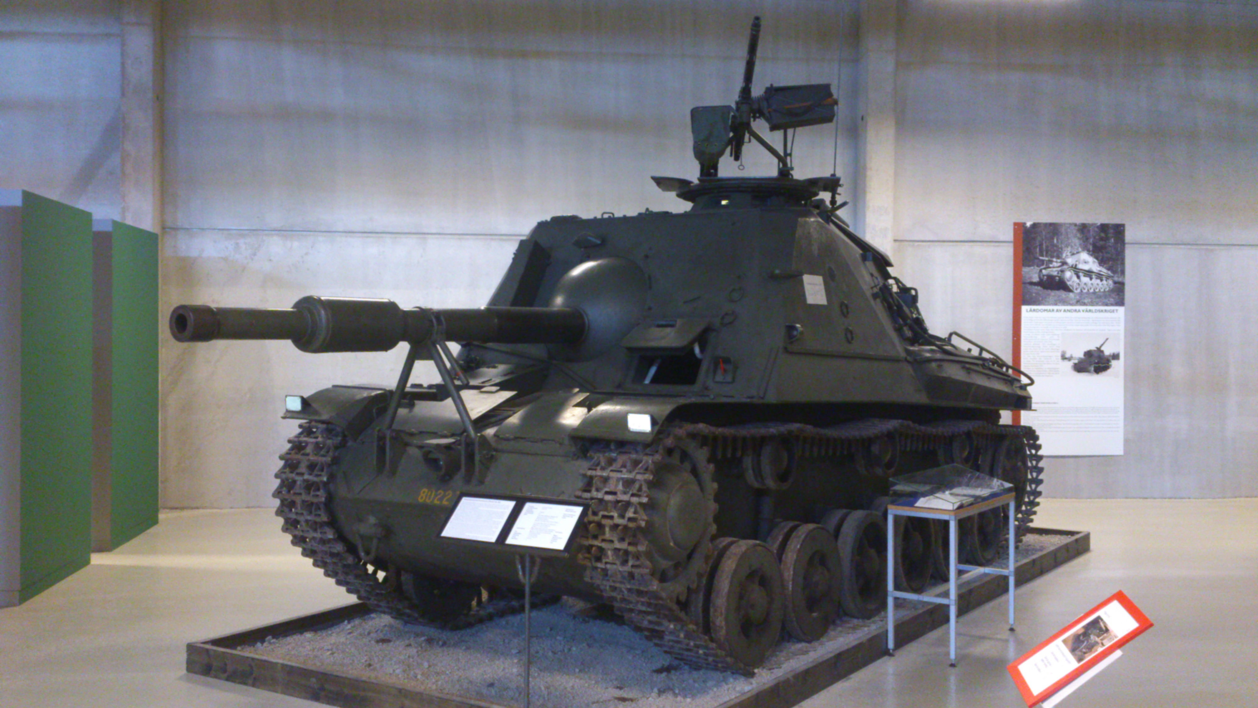 Pansarvärnskanonvagn M 43 på Försvarsfordonsmuseet Arsenalen i Strängnäs